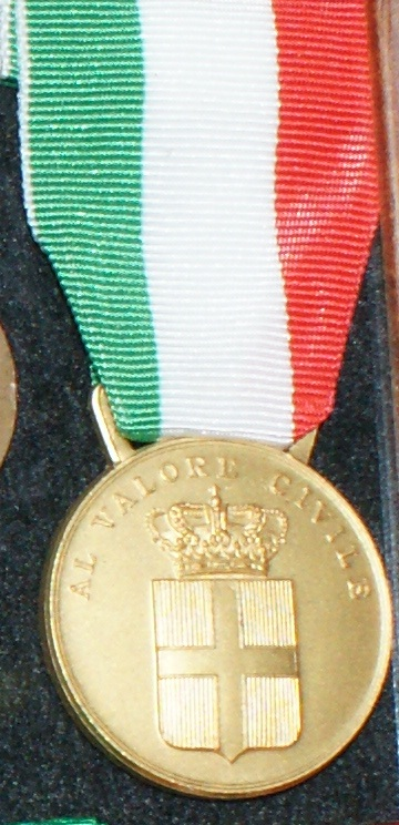 Medaglia al Valore Civile risalente al Regno d'Italia. Collezione privata